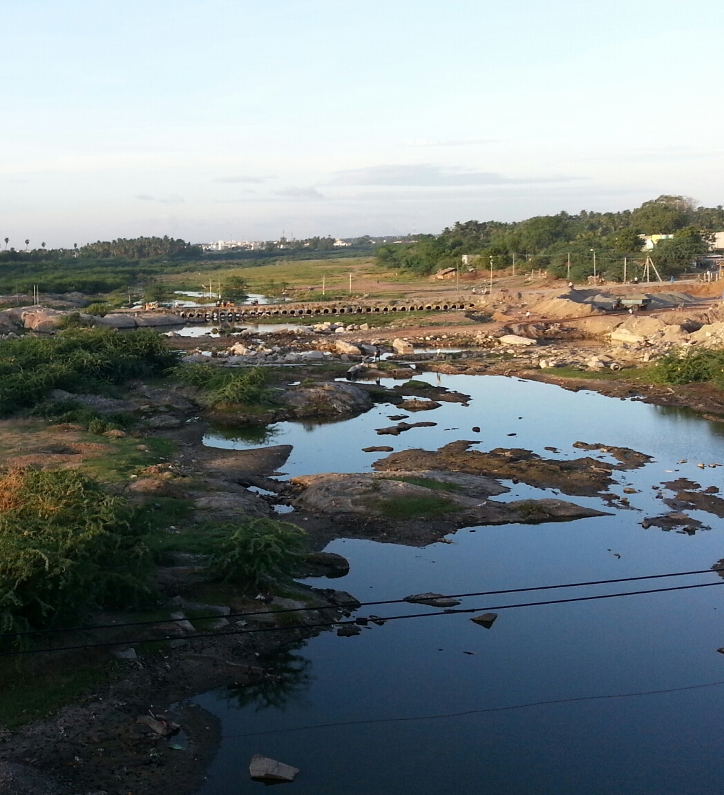 amaravathy river. karur. tamil nad